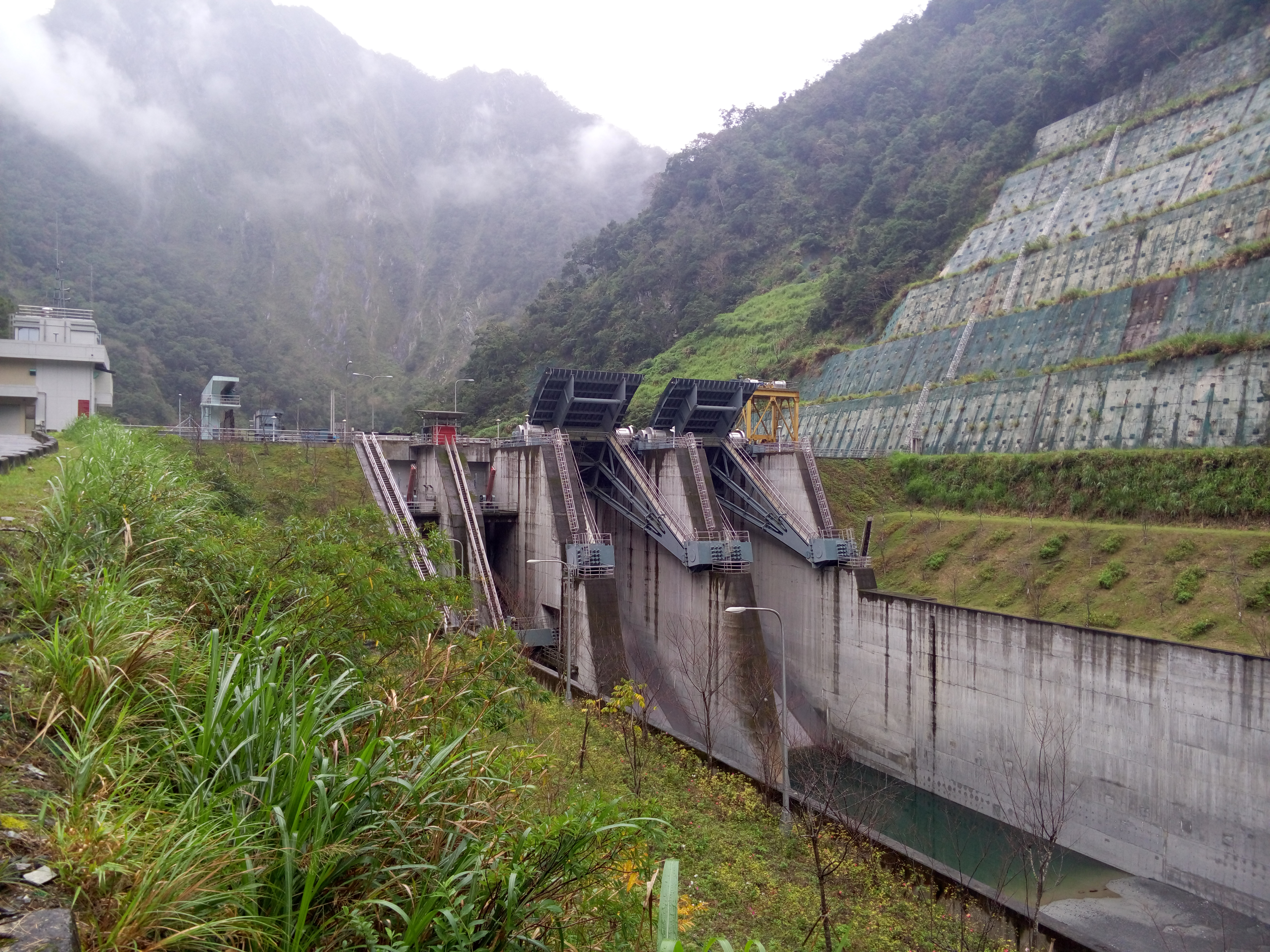 中文（台灣）: 臺灣電力公司東部發電廠碧海機組南溪壩 正面